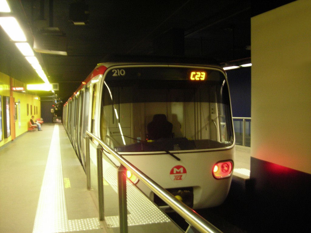 Metro C de Lyon au terminus Hotel de Ville - Louis Pradel